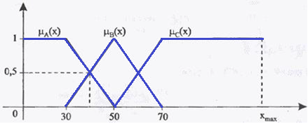 рисунок 12